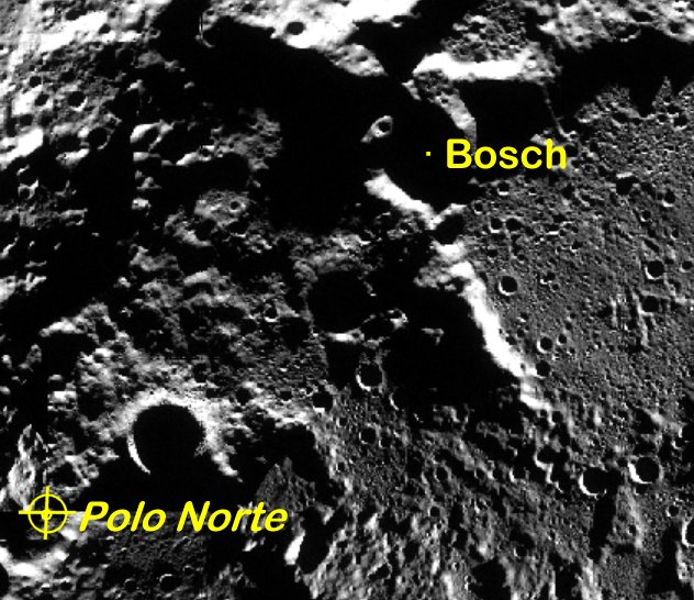 Cráter lunar Bosch. (Imagen LRO)